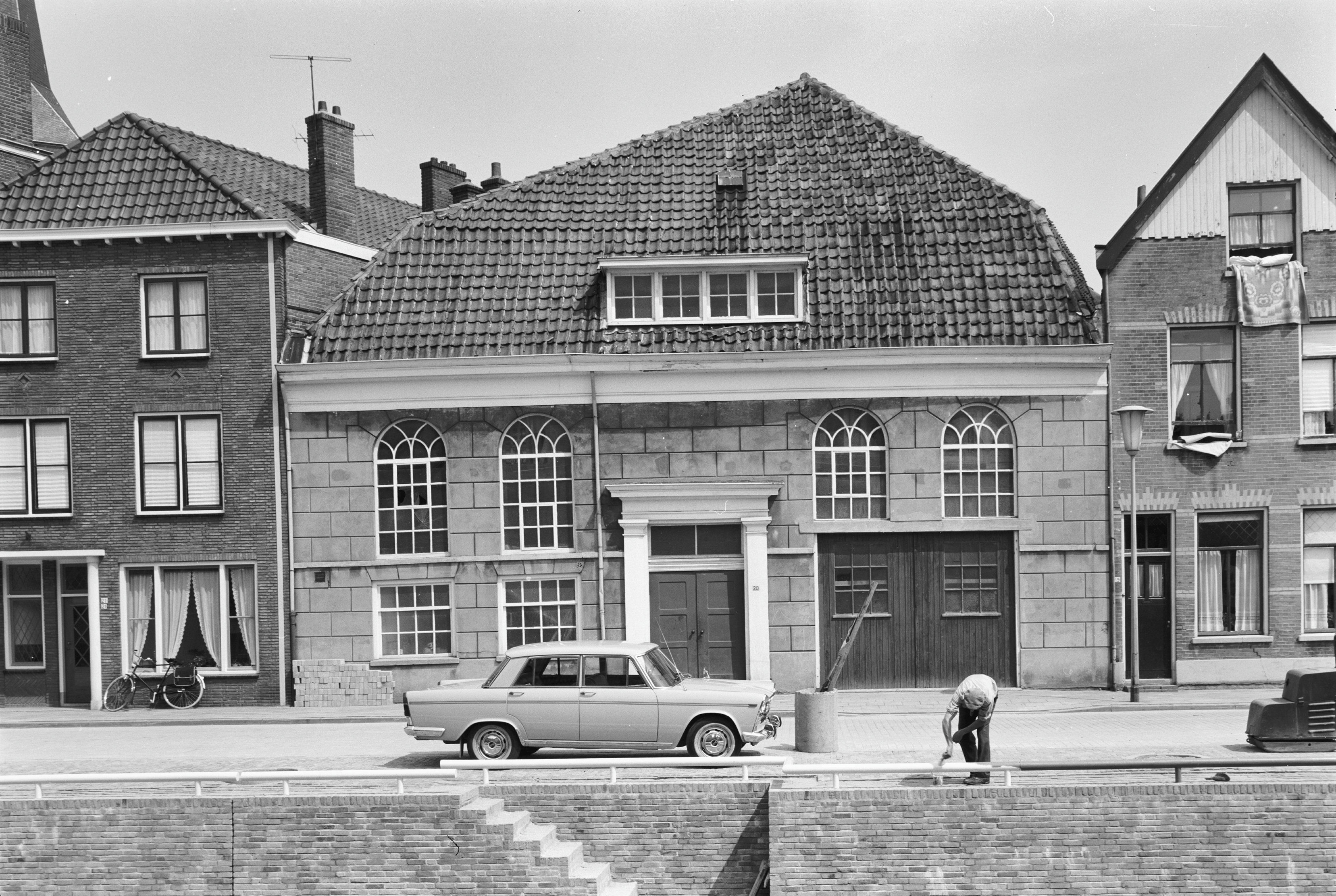 voorgevel voormalige Klumpieskarke van de Gereformeerde Gemeente